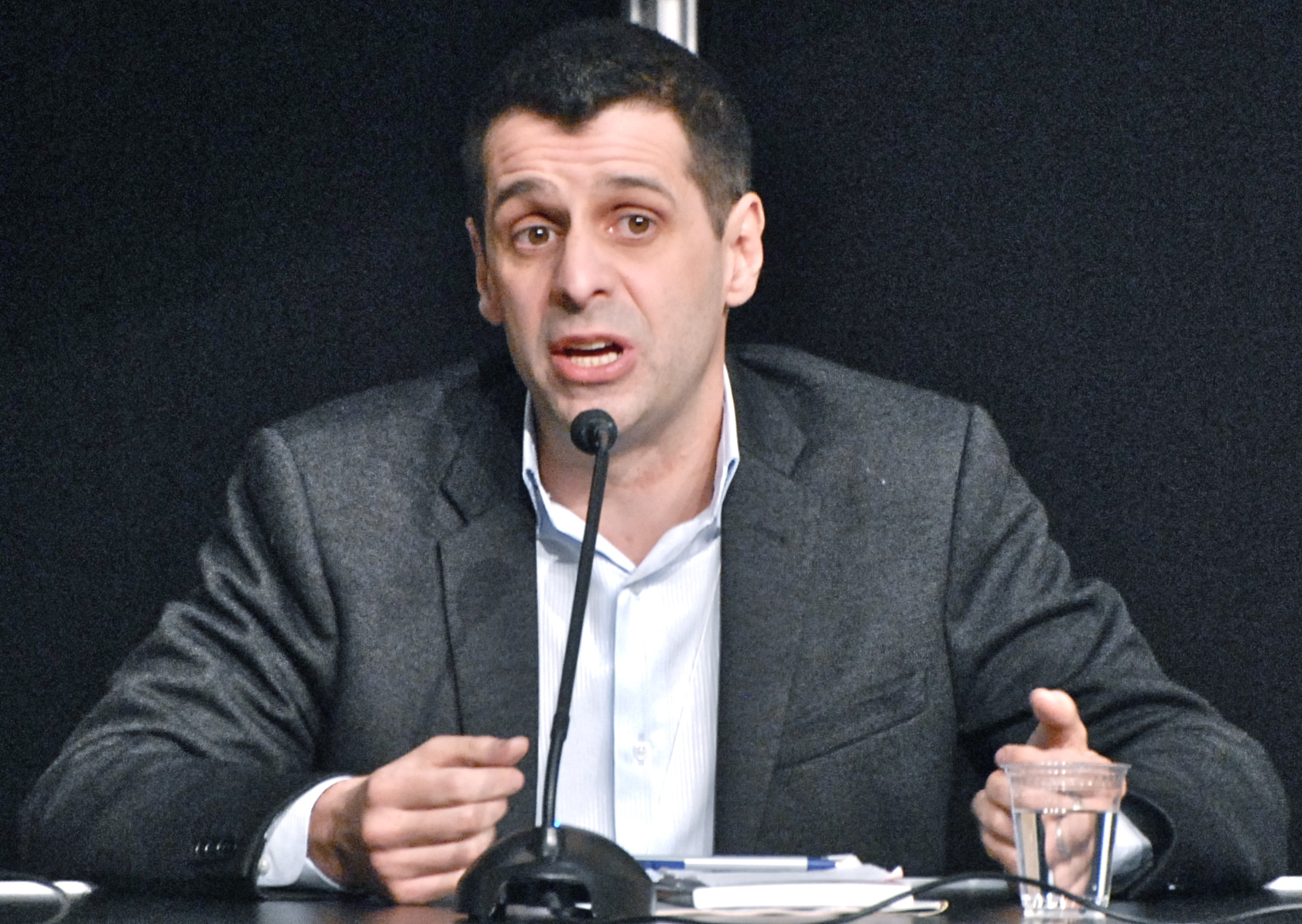 Éric Duhaime, lors du Salon international du livre de Québec 2012